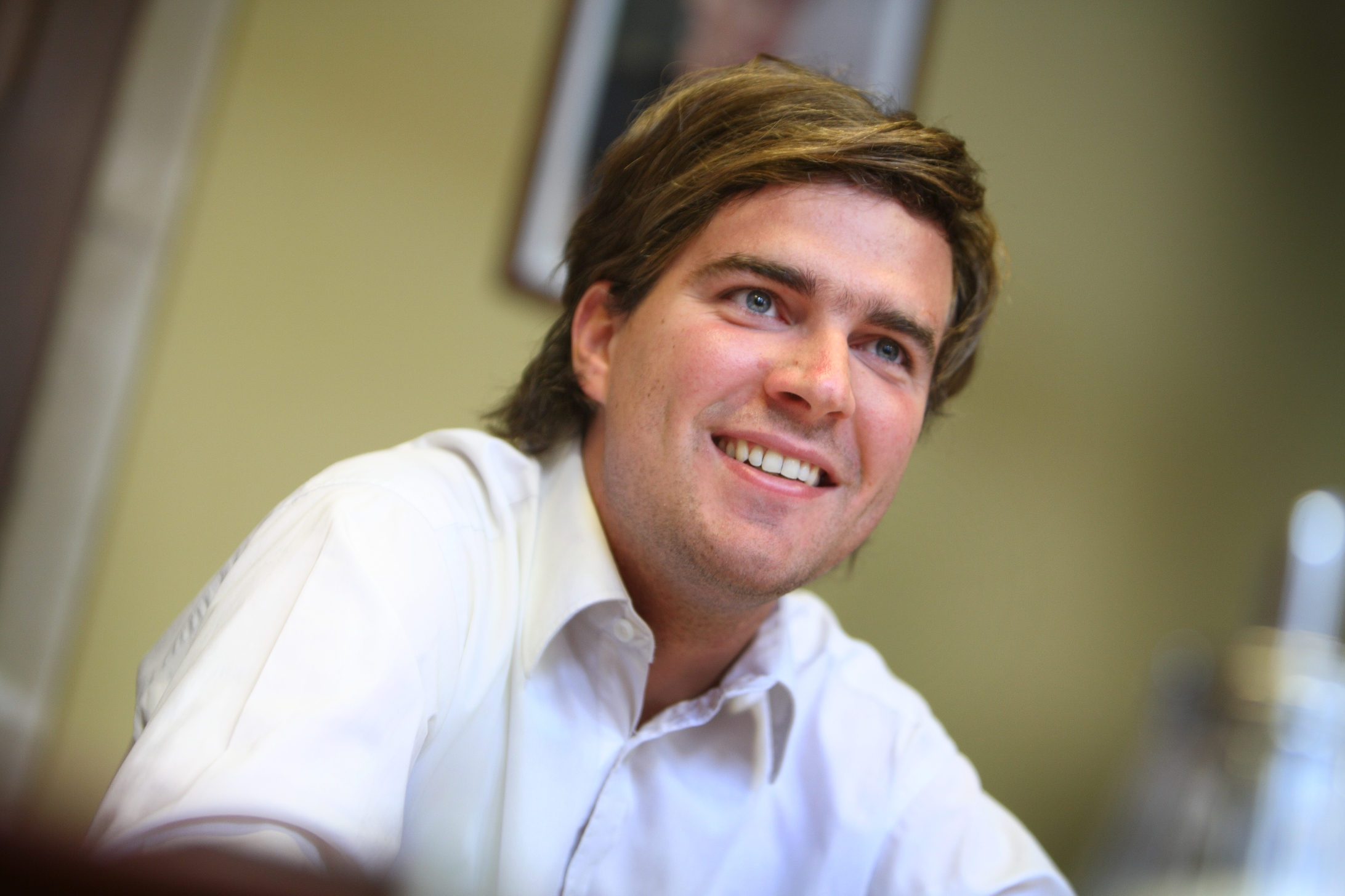 Mathias De Clercq